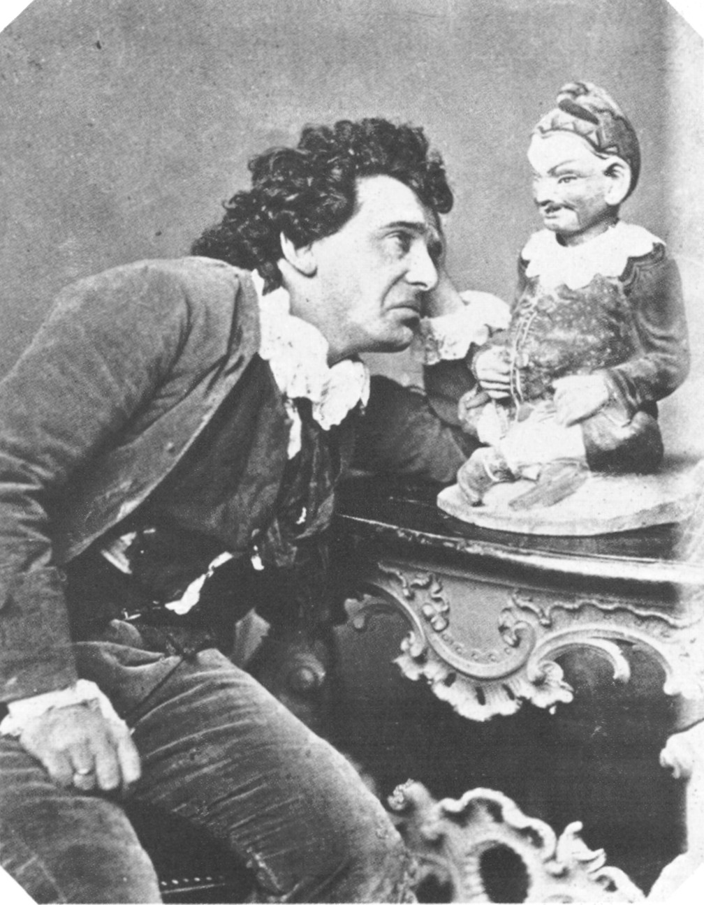 Ernst vonPossart (1841-1921)